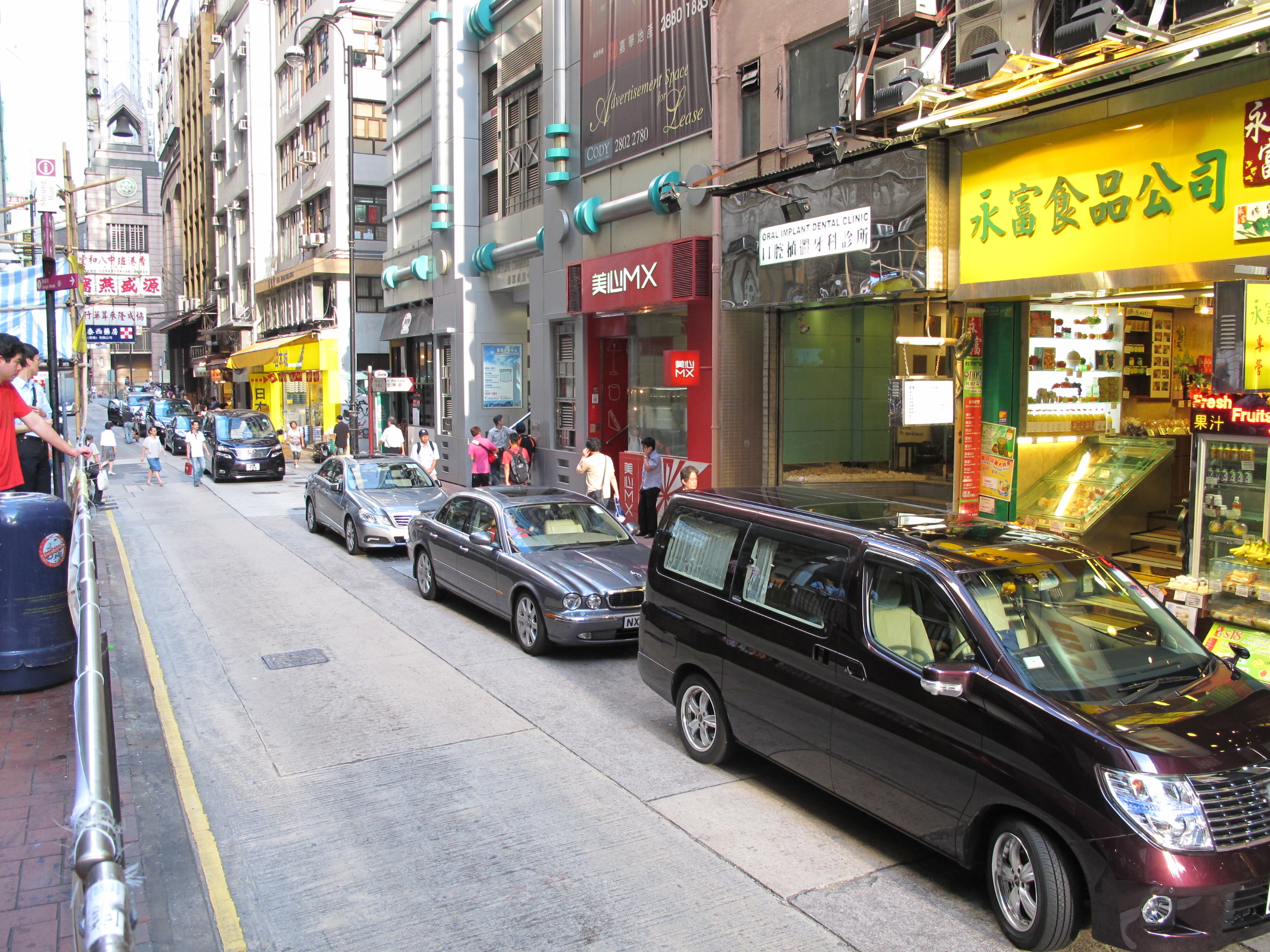 Wing Lok Street